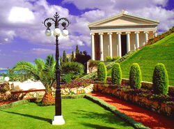 Internationales Baha'i Archiv